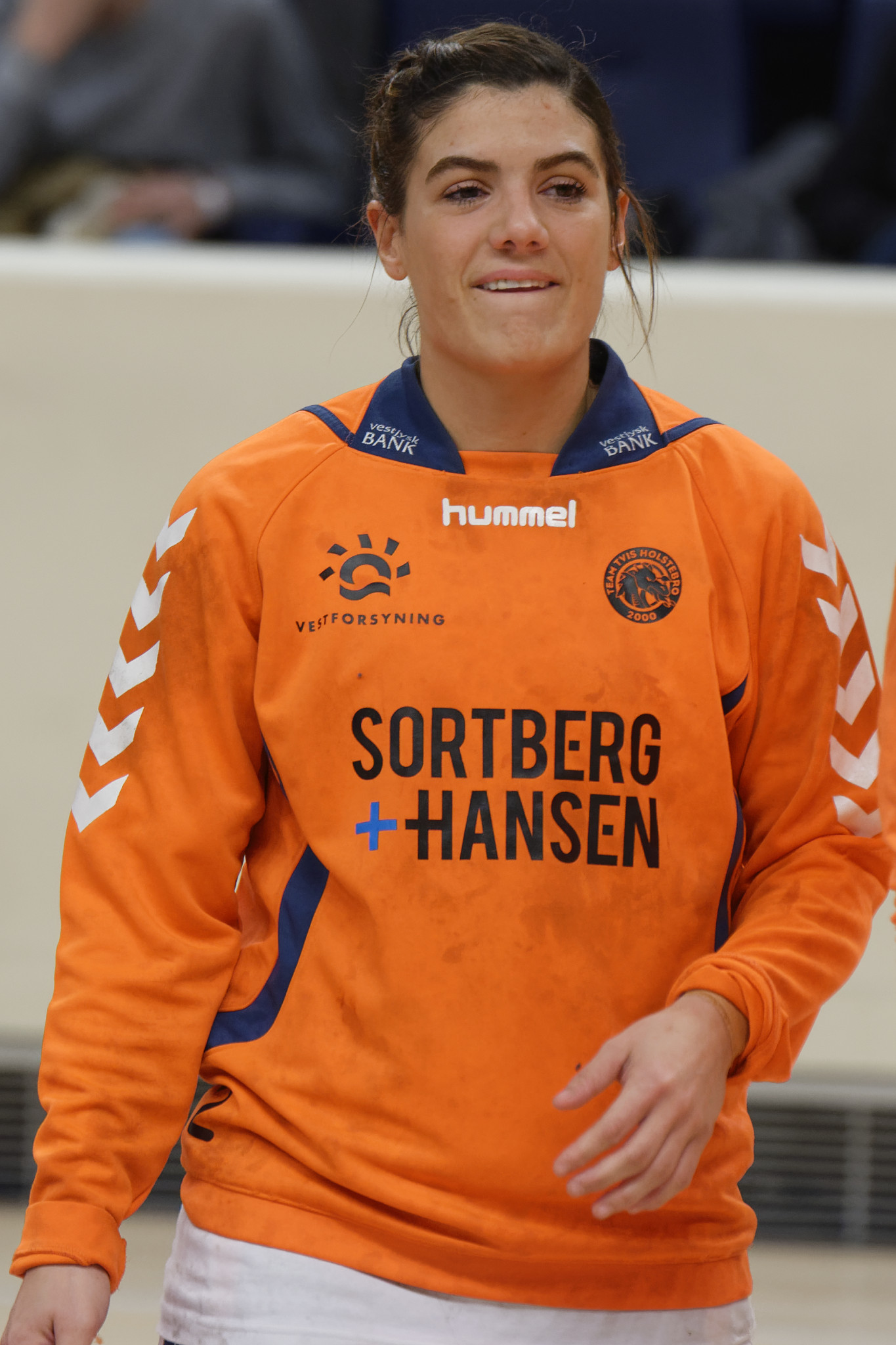 Rencontre de Coupe EHF entre Issy Paris Hand et les danoises de Team Tvis Holstebro. A Coubertin, le 13 mars 2015.